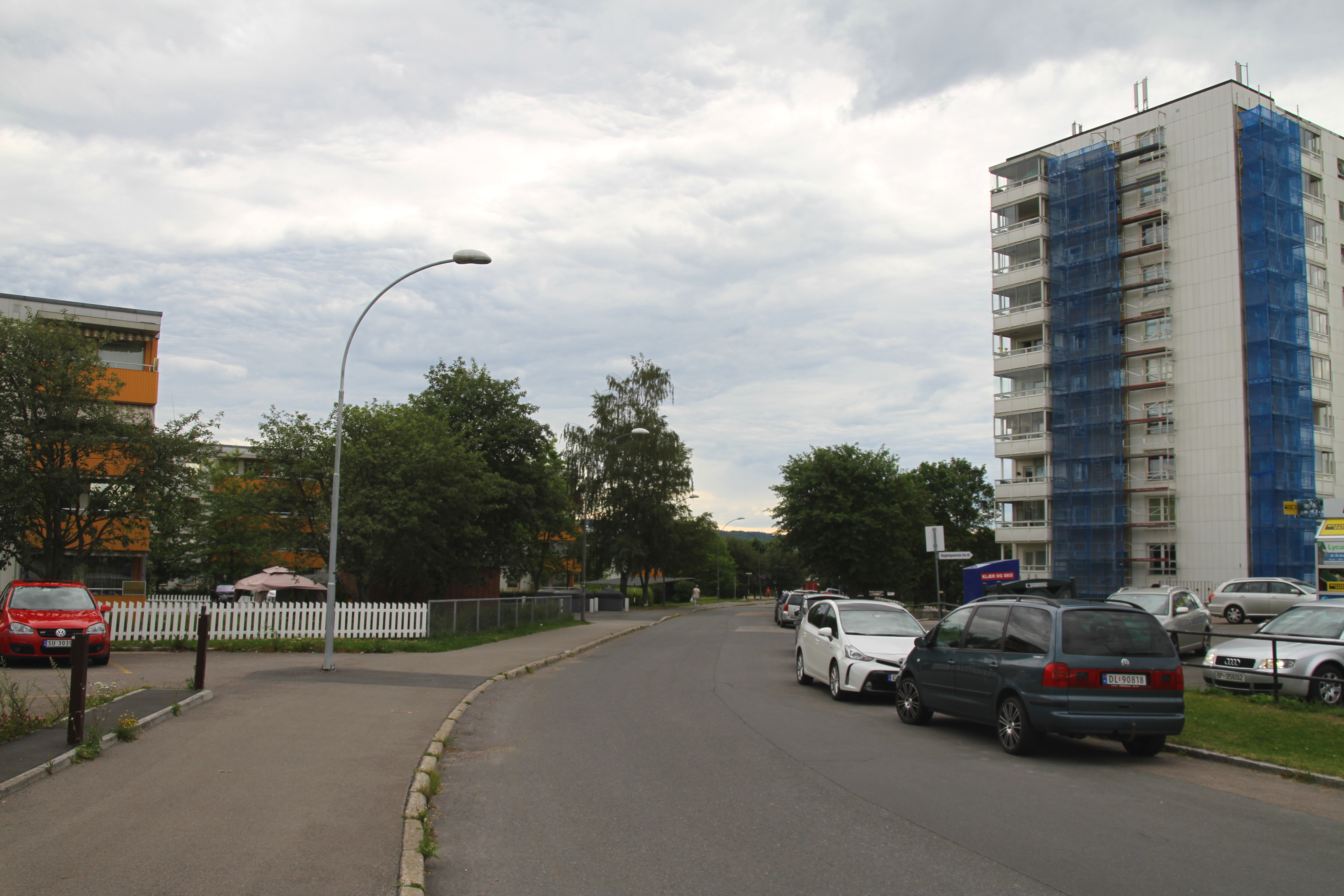 Gangstuveien, Oslo